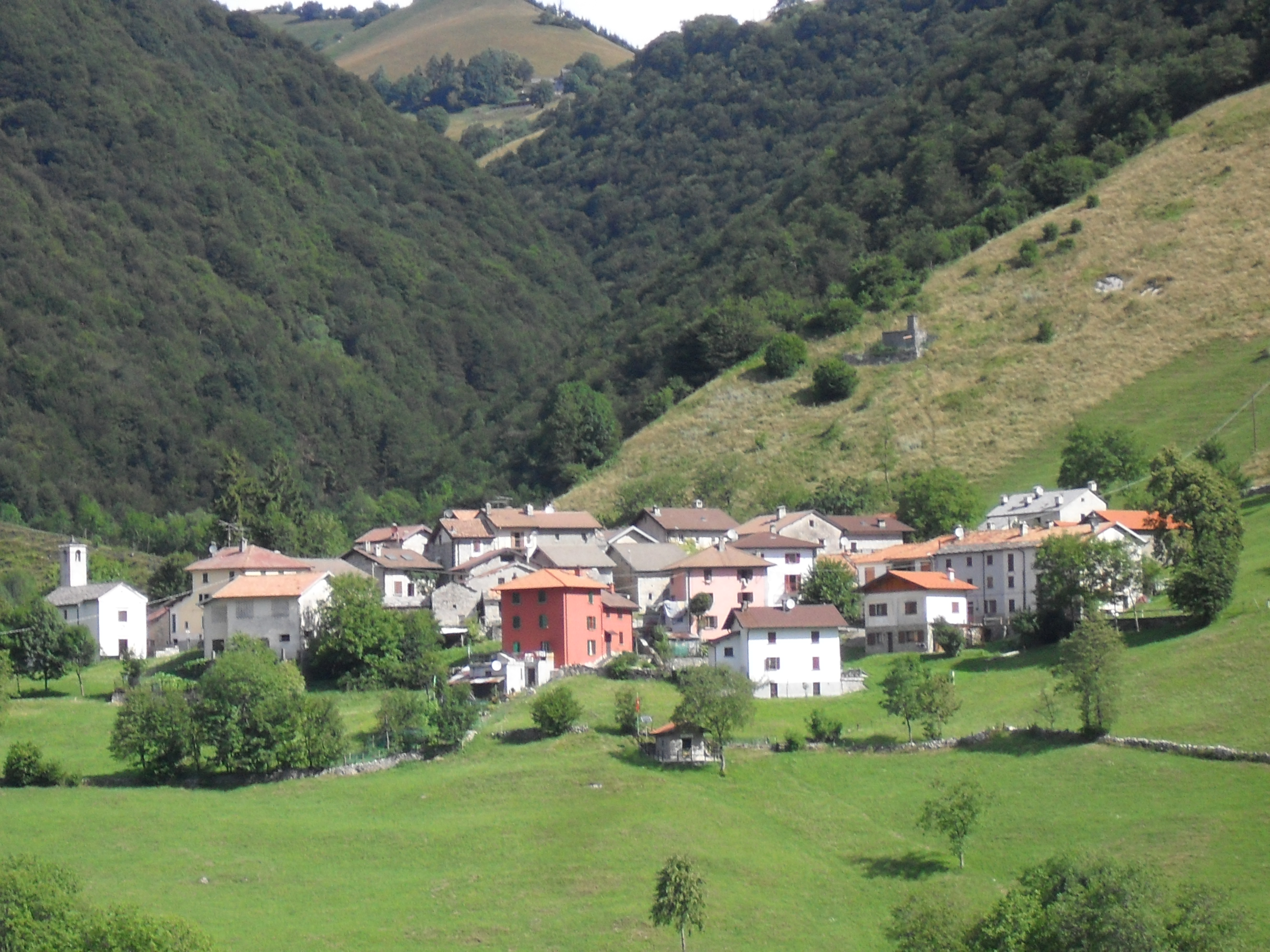 Panorama di Erbonne